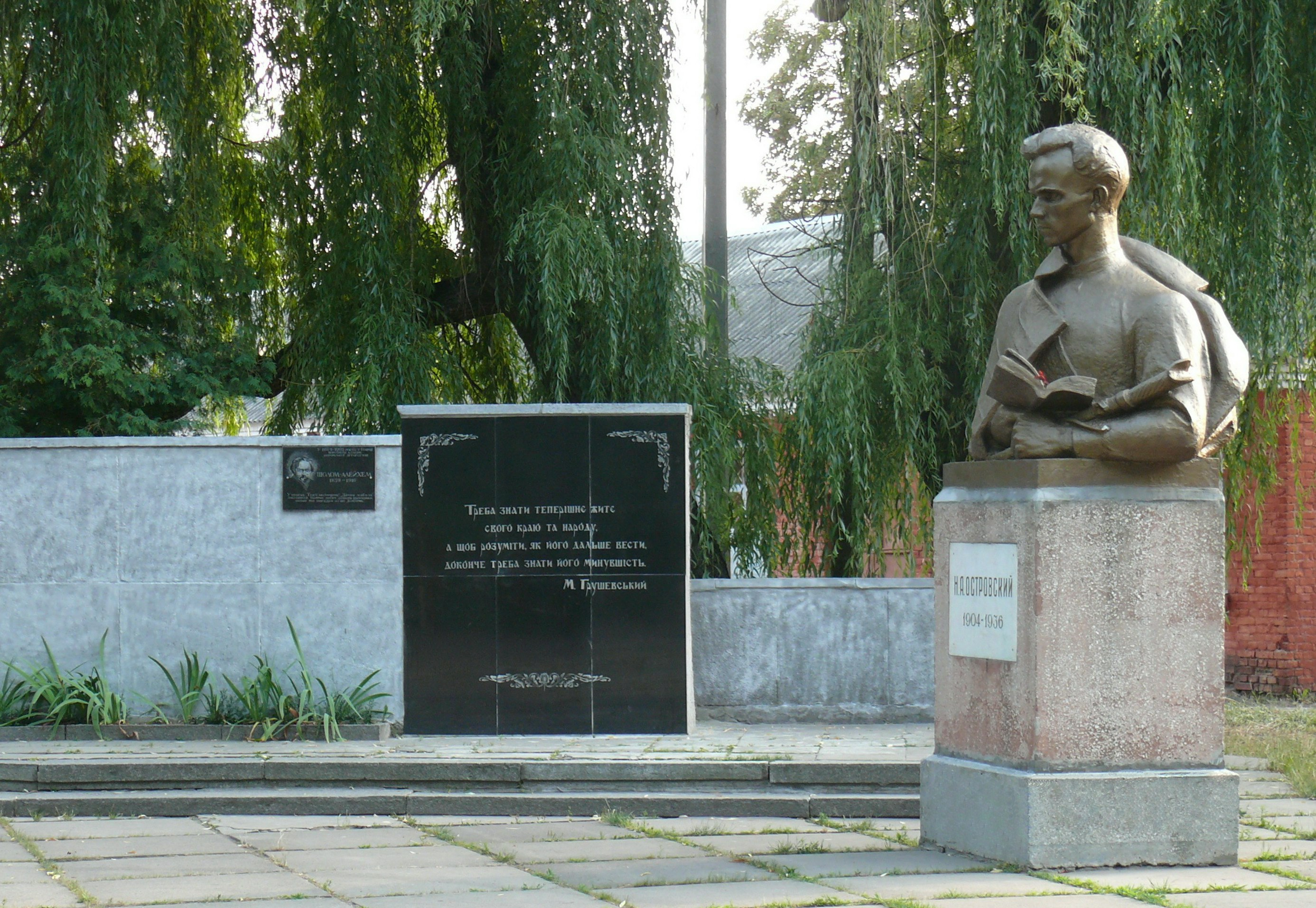 Музей. Памятник Островскому.